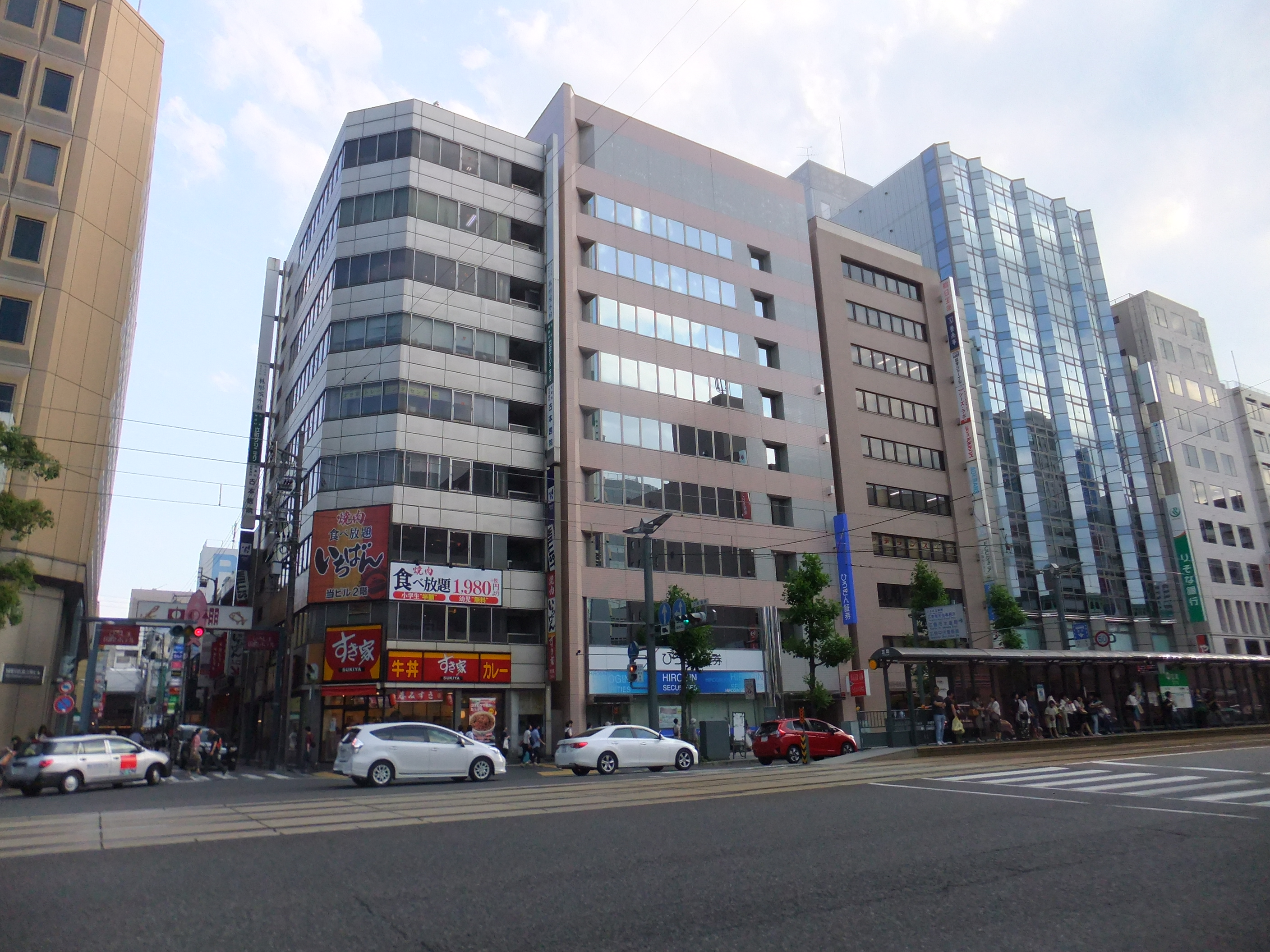 ひろぎん証券本社